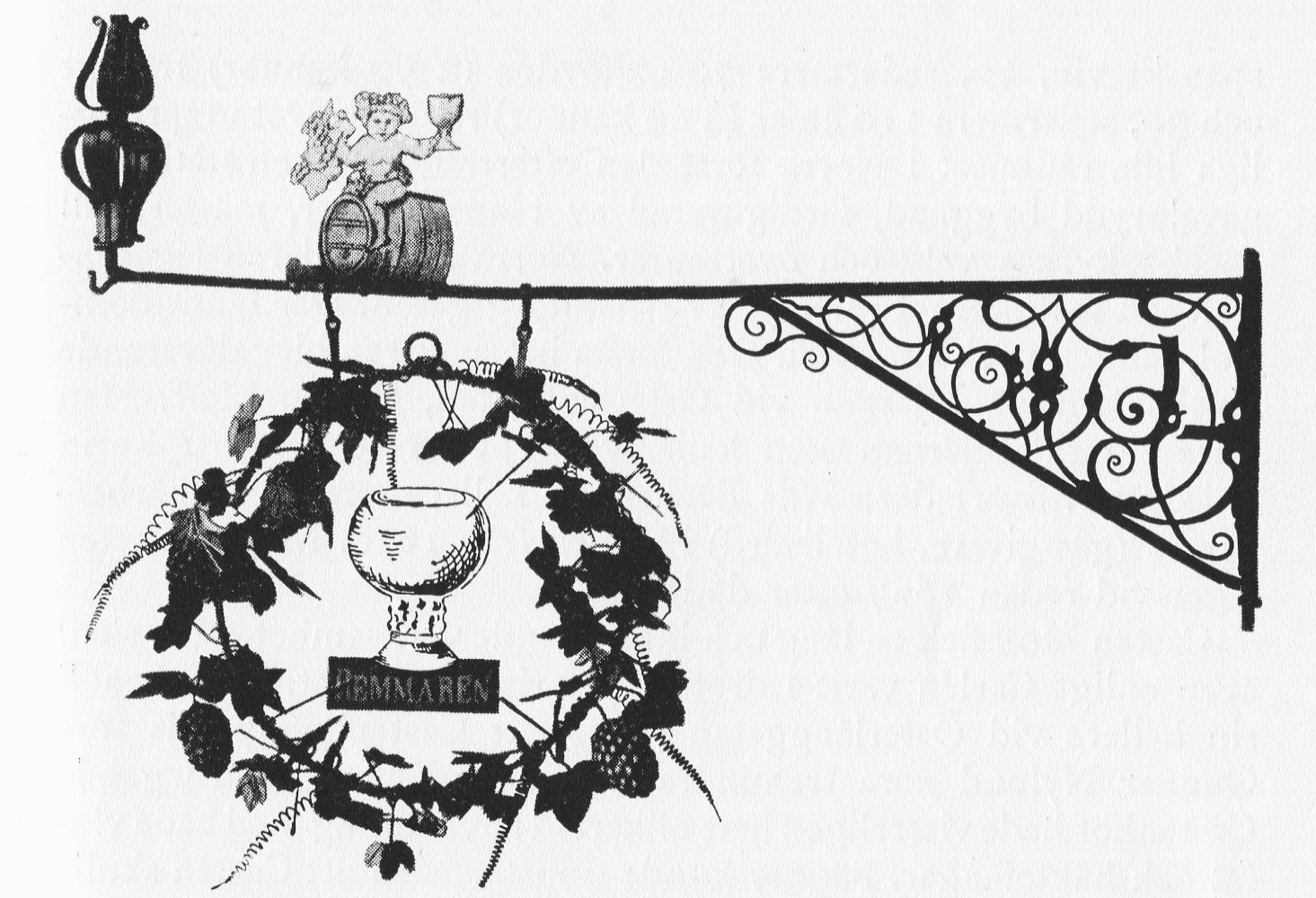 Källaren Remmaren skyt. Skylten betår av ett metallstycke format som en remmare (kalk) med en skylt med texten "REMMAREN". Skylten är kringgärdad av en ring bestående av vinblad och klängen samt druvklasar i snidat trä. Skyltarmens spets prydds av en tulpanlikande smidesutsmyckning. 2/3 ut på armen är en guldfärgad figur bestående av en tunna och därpå sittande putti hållandes i en druvklase i högra handen och en kalk i vänstra. Smidet mellan armen och armstaget är nonfigurativt.